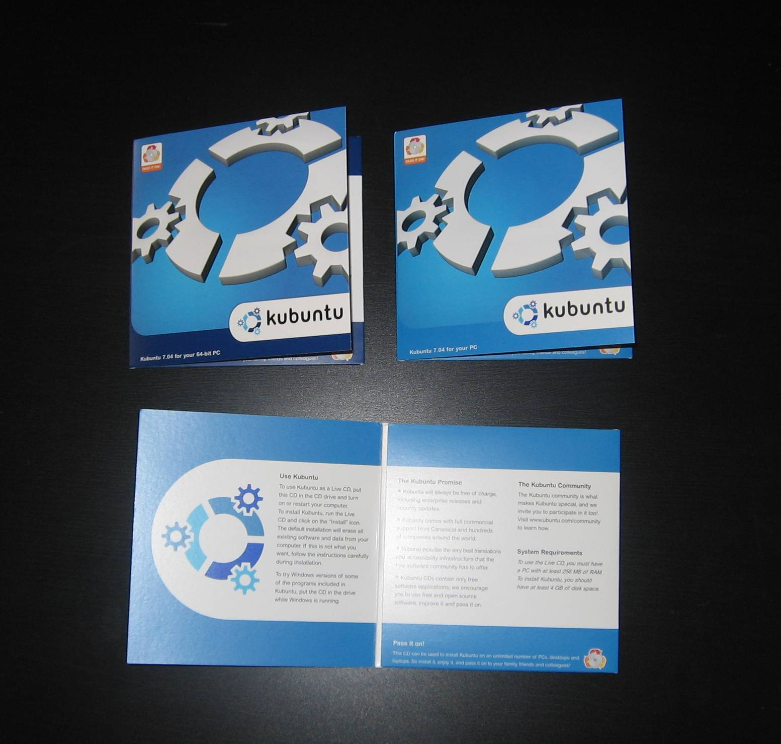 Kubuntu 7.04 versión CDs. CDs de la versión 7.04 de Kubuntu.